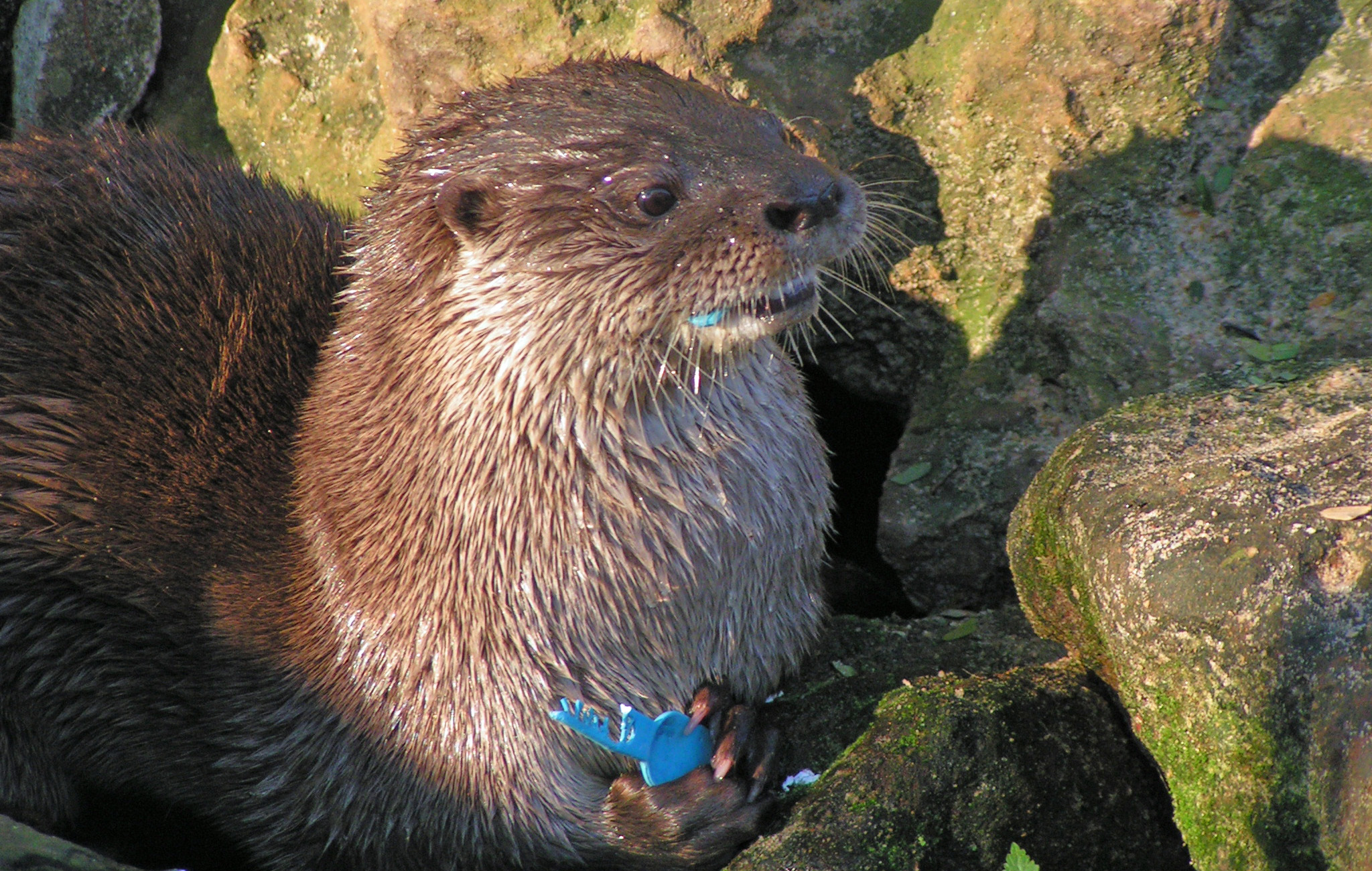 Lobito de río (Lontra longicaudis)